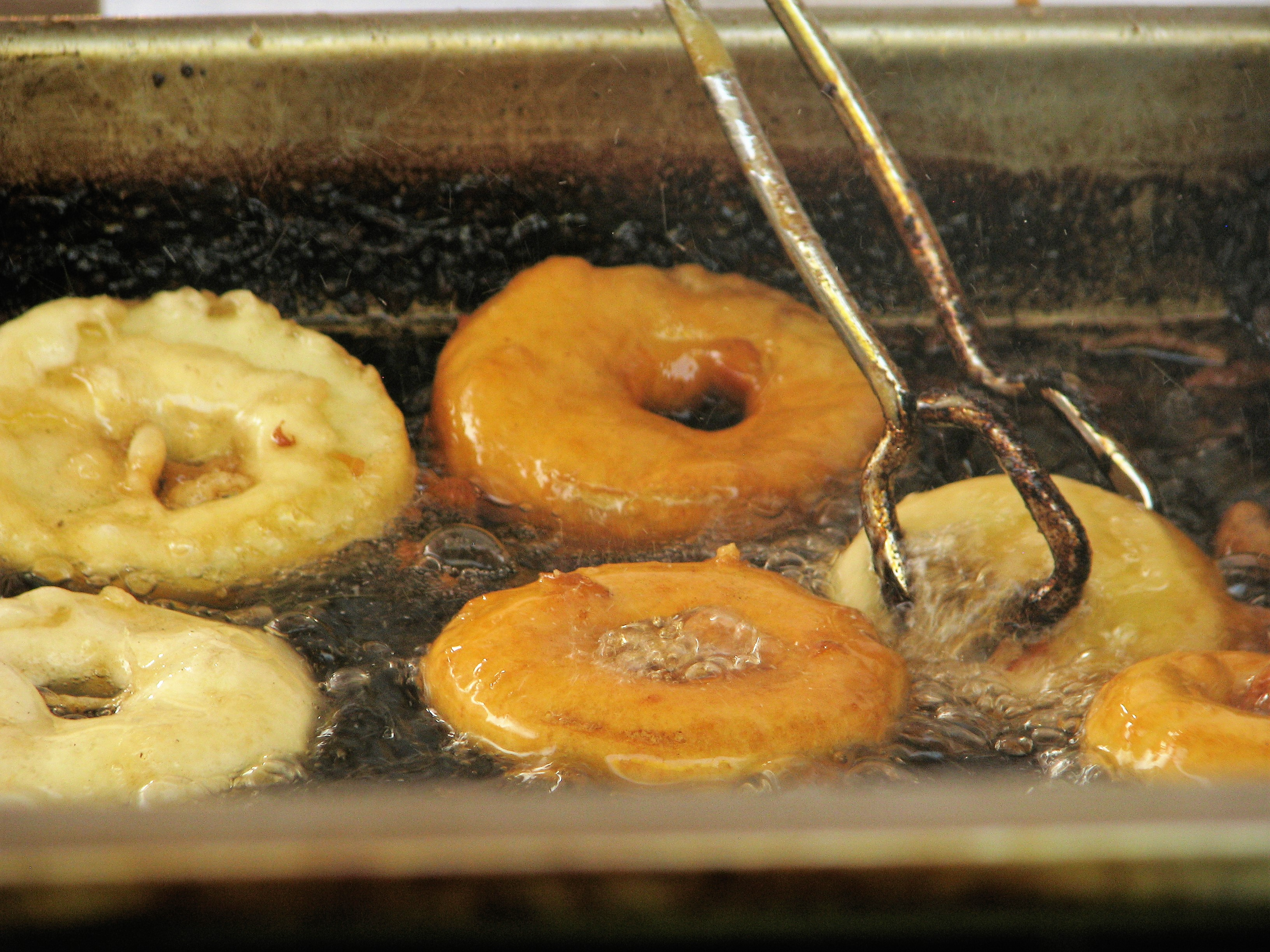 Ausbacken von Apple fritters (englisch: Apfelküchle) in heißem Fett.